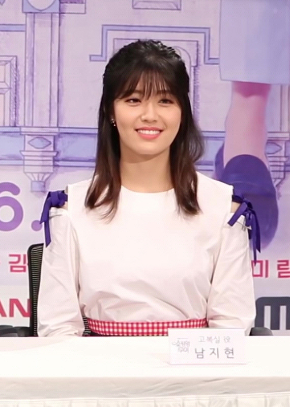 (TV10) 쇼핑왕 루이 서인국, 거지 분장… 감독님이 말릴 정도로 적극적 (제작발표회)